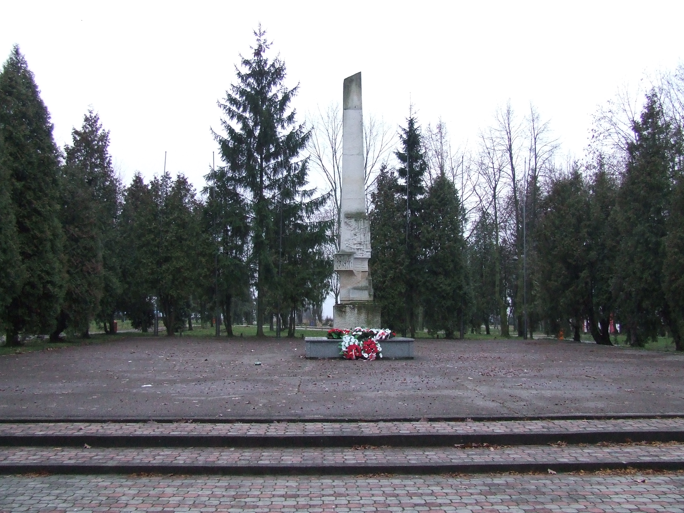 Pomnik "Zginęli za Polskę" / Monument "Zginęli za Polskę"